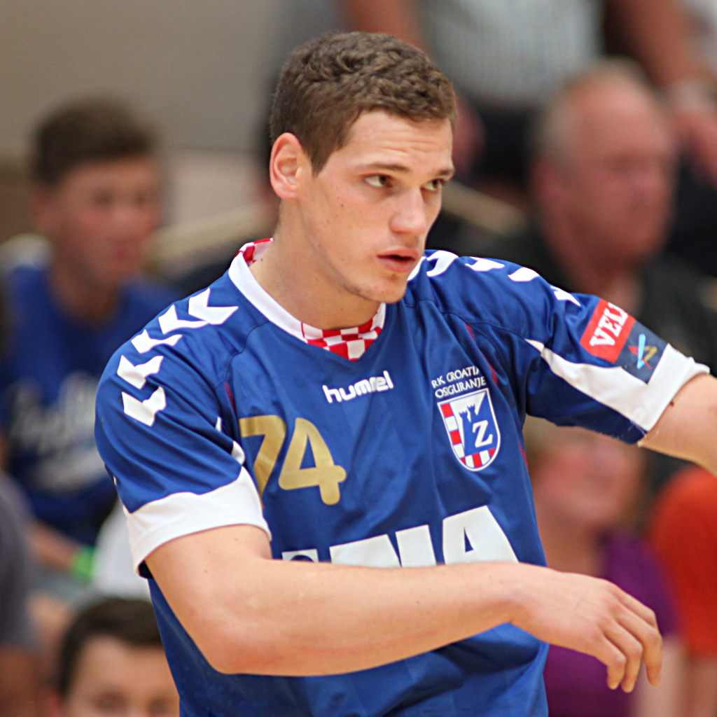 Mario Vuglač, Handballspieler bei RK Zagreb am 16. August 2014 beim Sparkassen-Cup in Ehingen.